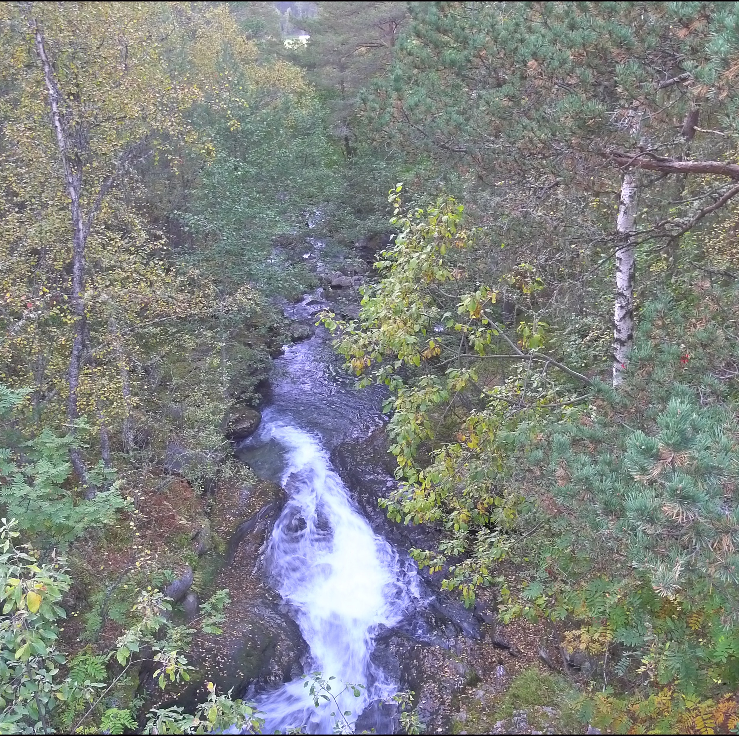 Dindøla mot utløpet i Driva